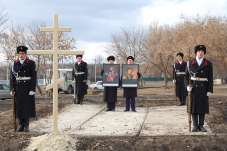 Казаки-кадеты на месте обнаружения останков героев Отечественной войны 1812 года